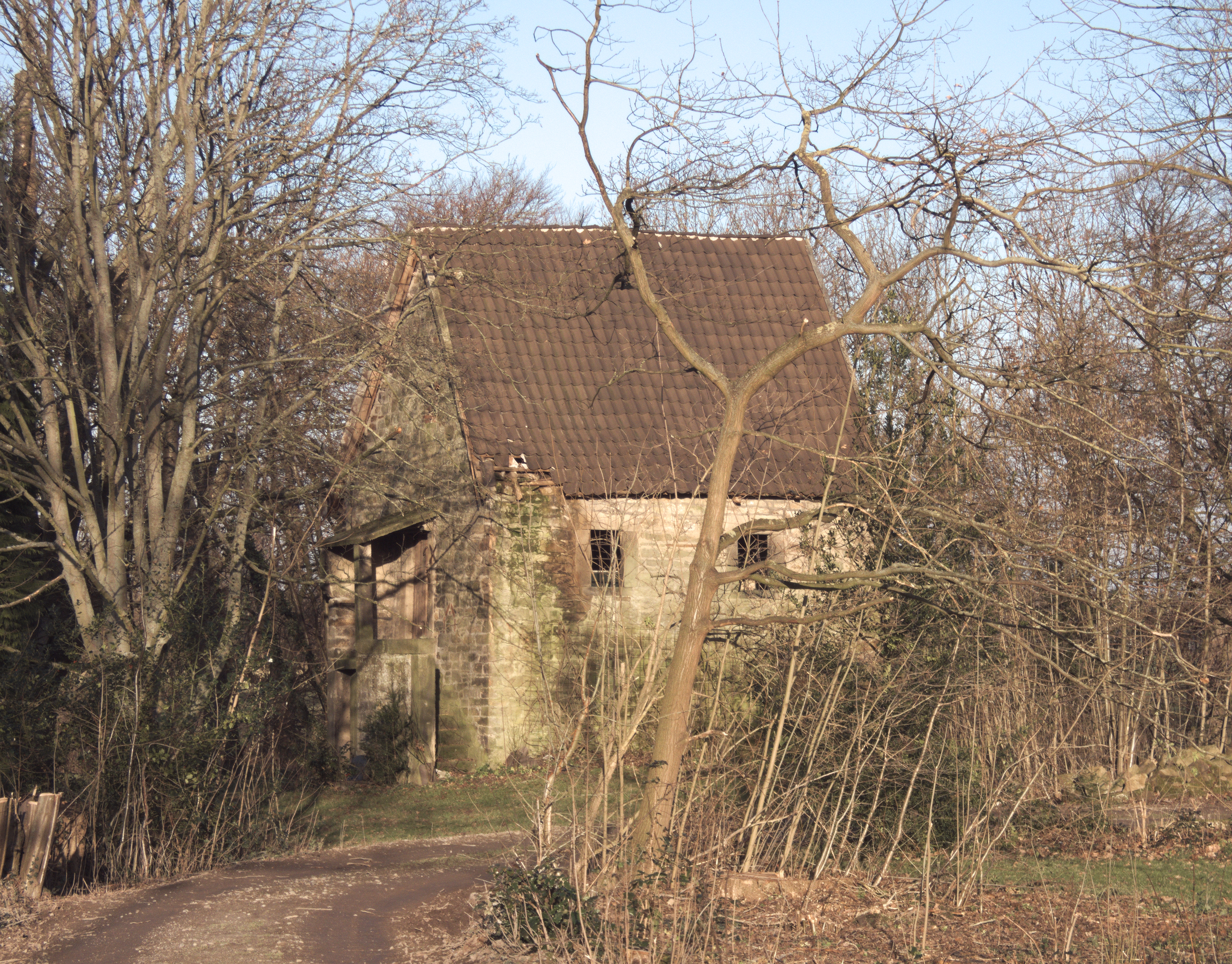 Der zweistöckige Speicher aus Bruchsteinmauerwerk im rückwärtigen Grundstücksbereich des Untergutes in Egestorf (Deister) stammt laut Inschrift im Türbalken aus dem Jahr 1598. Das Gebäude gilt als einmalig in der Region Hannover